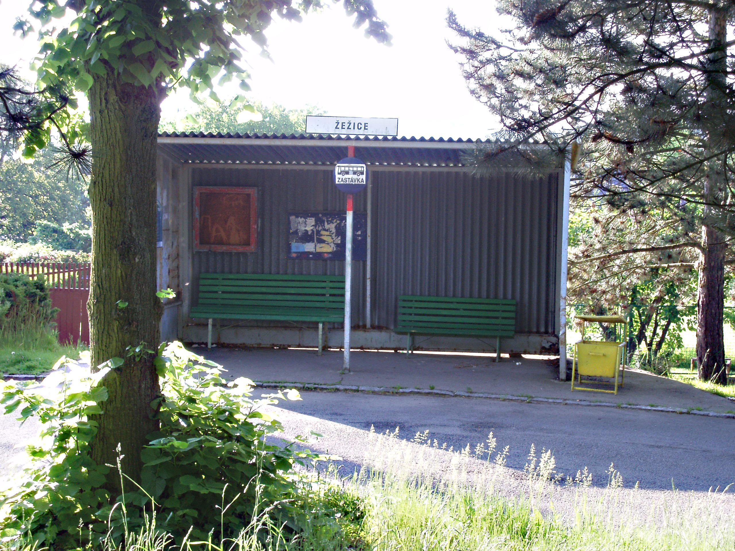 Žežice - zastávka